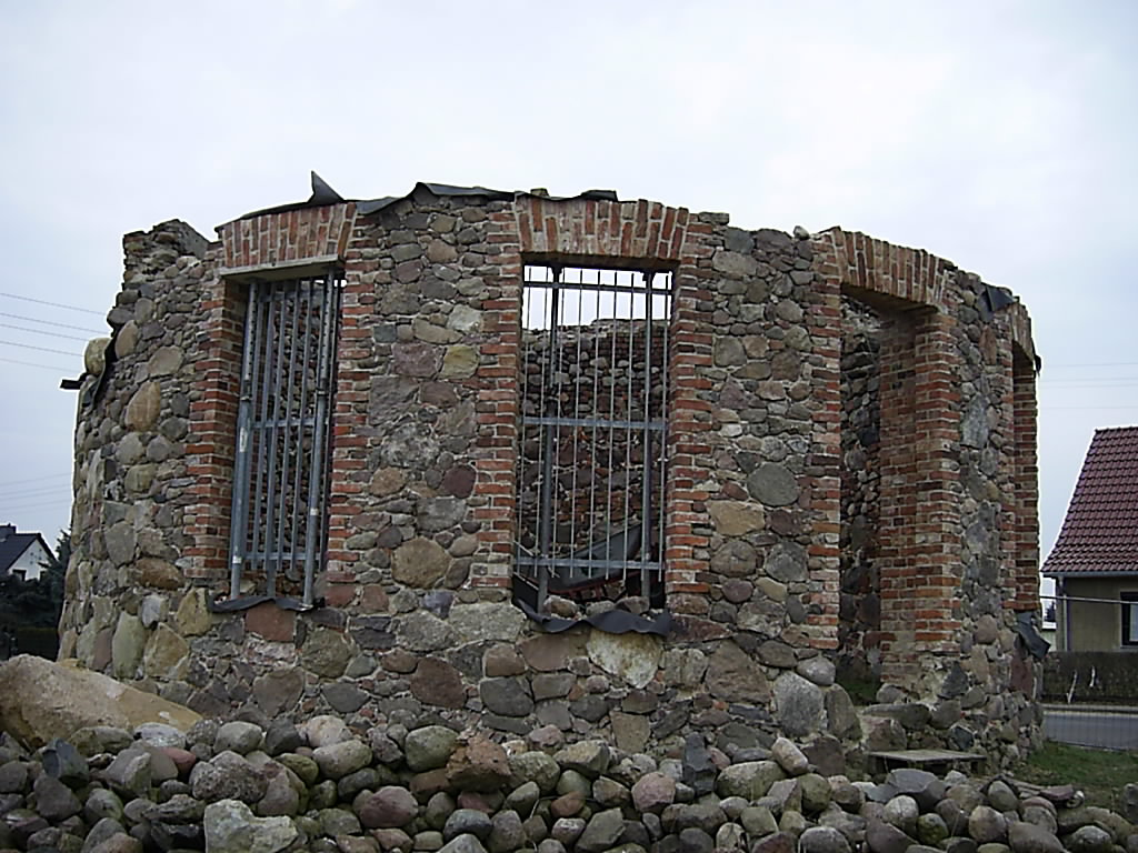 Bismarckturm Frankfurt (Oder)-Lichtenberg, Deutschland.